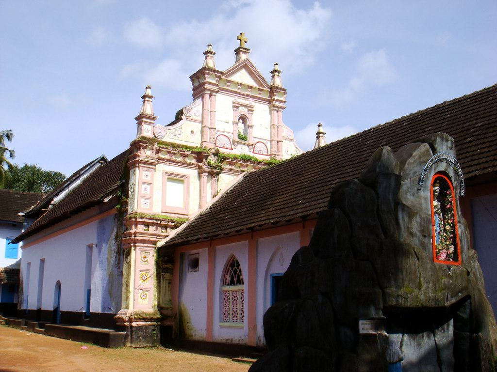 അങ്കമാലിയിലെ വി.ഹോർമിസ് പള്ളി.